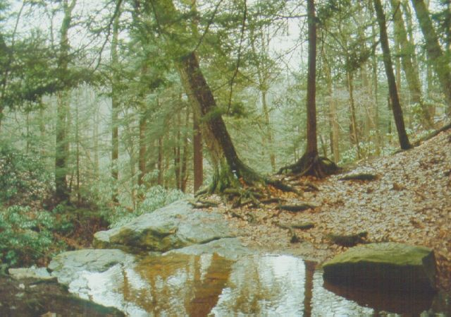 Linn Run State Park